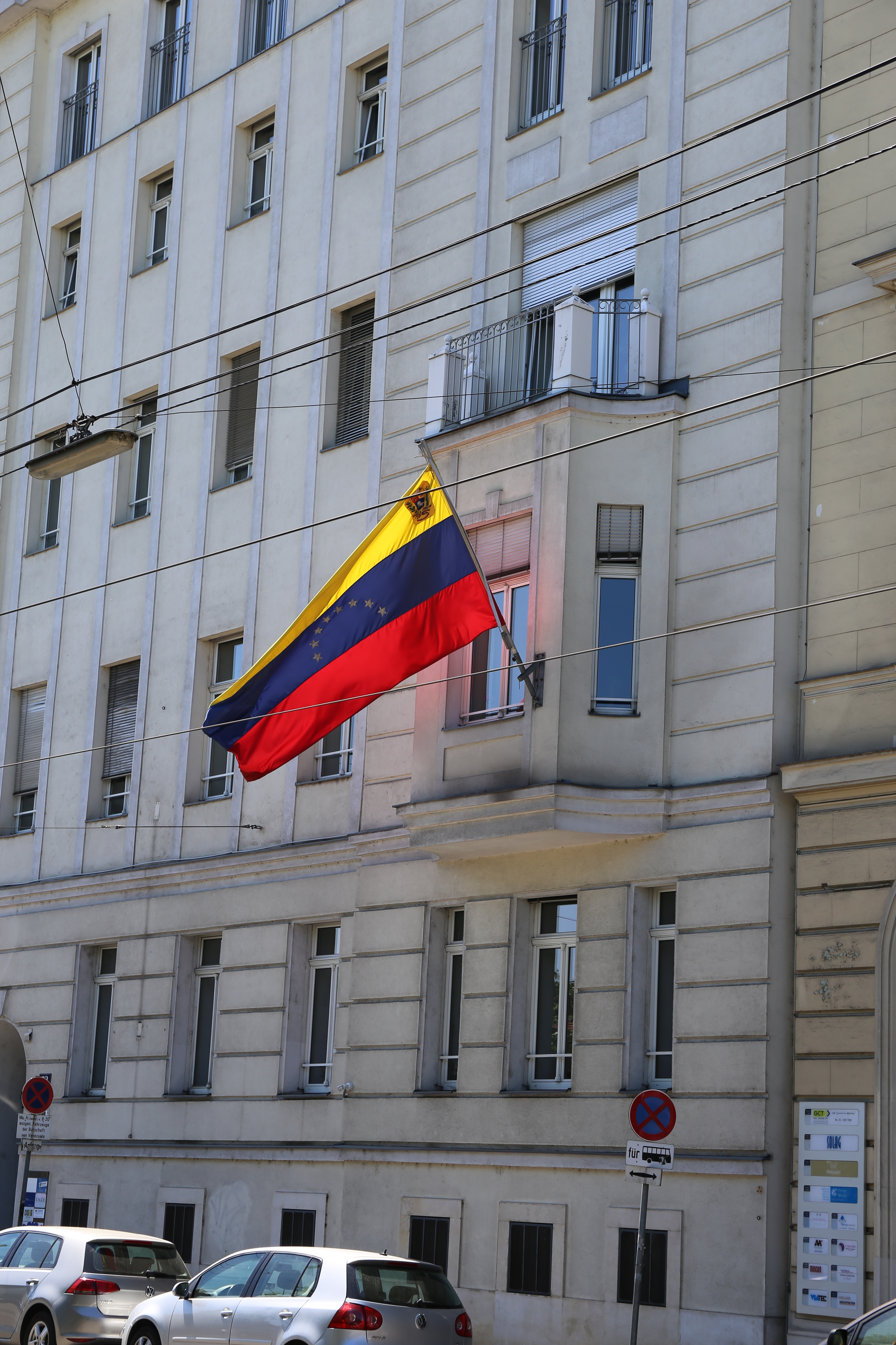 Ambassade du Venezuela à Vienne.